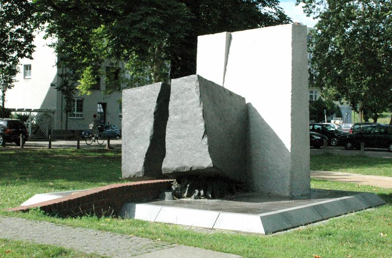 Foto Mahnmal Judenverfolgung Spandau